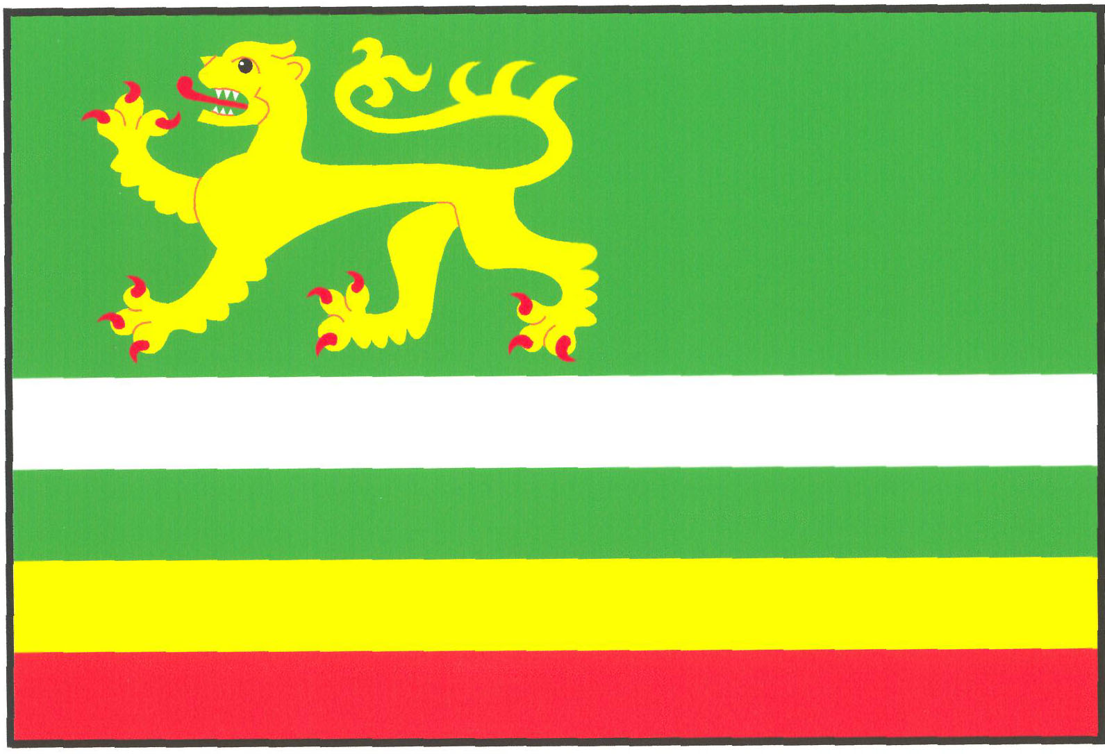 Vlajka obce Záborná